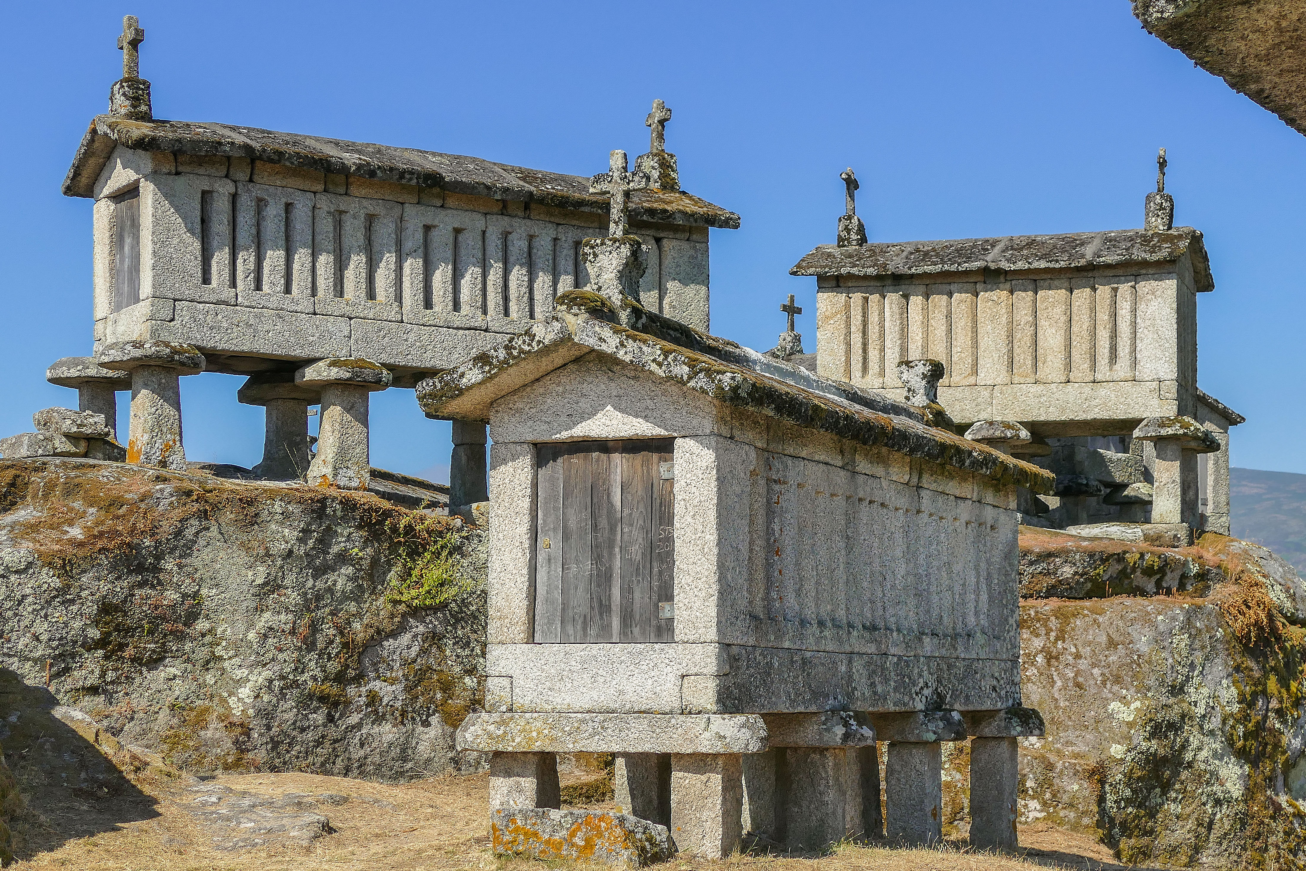 Gut erhaltene Espigueiros